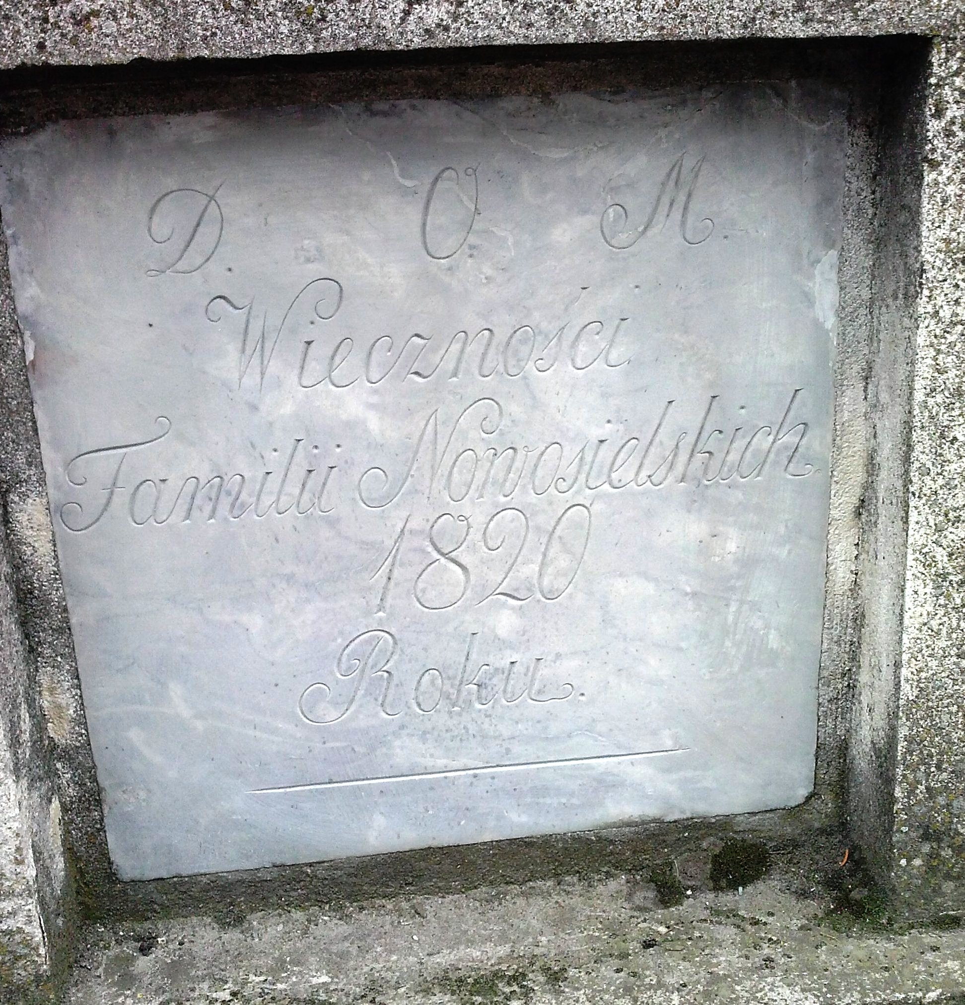 Dom Wieczności Familii Nowosielskich - zasoby Biblioteki Szymczak-Nowosielskich